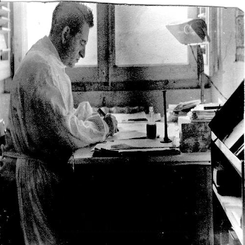 תיאודור זלוציסטי, מהמשתתפים בקונגרס הציוני הראשון, מראשוני הציונים בגרמניה, ( 1916) .